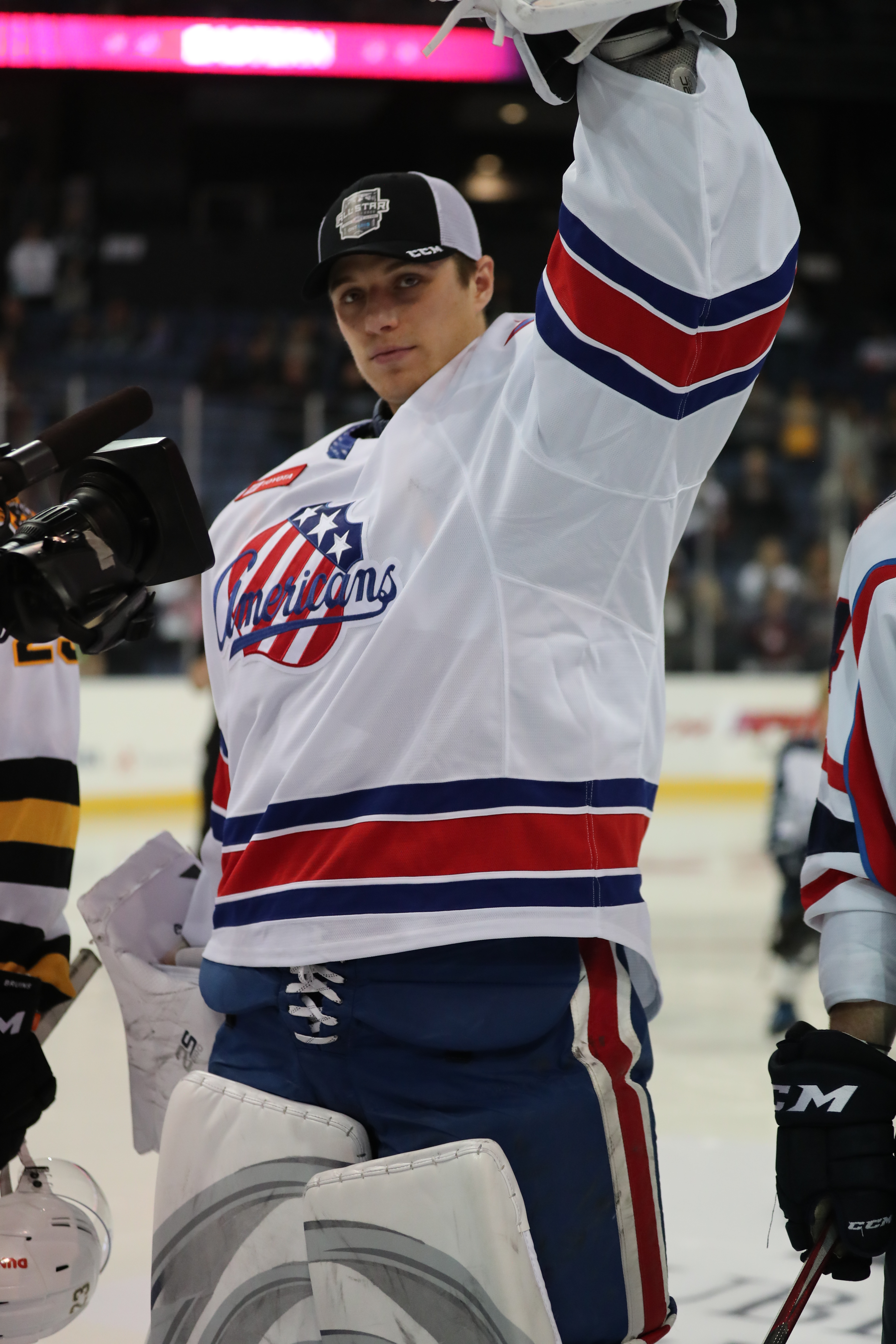 AA3I0766